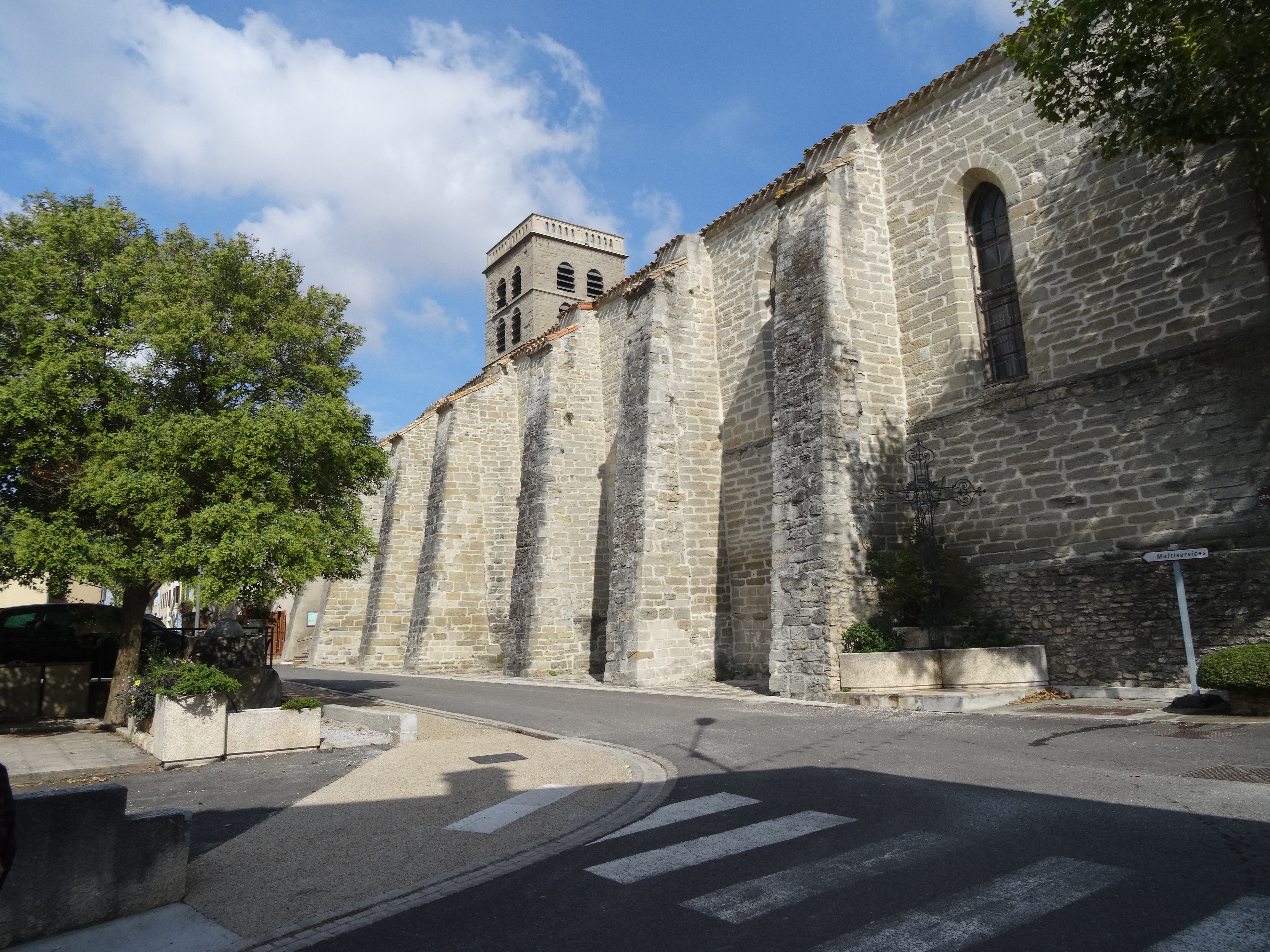 Eglise St Martin .